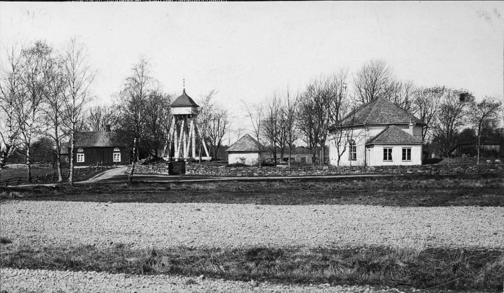 Kyrkan och klockstapeln mot öster. Kategori: (01) ExteriörerKyrkan och klockstapeln mot öster.